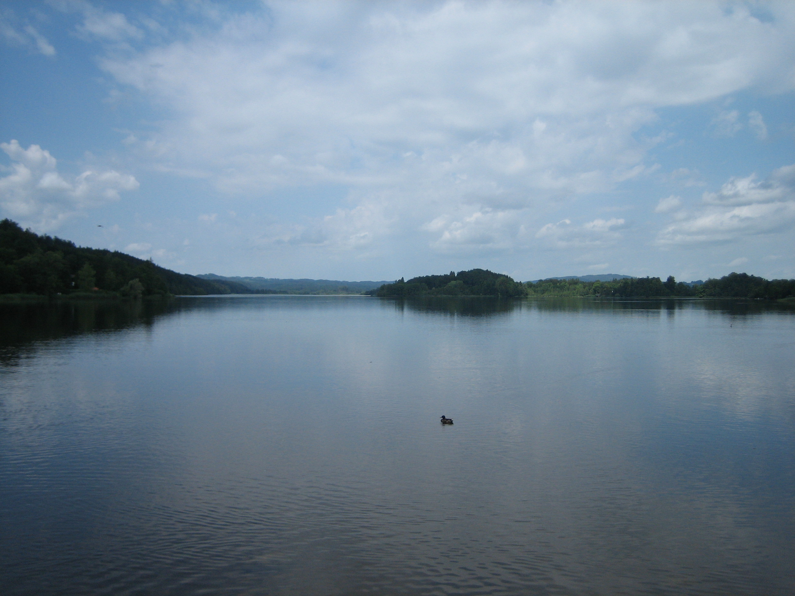 am Staffelsee